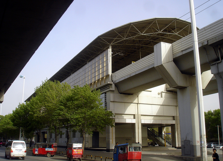 中文（中国大陆）: 新立站（地铁津滨线）